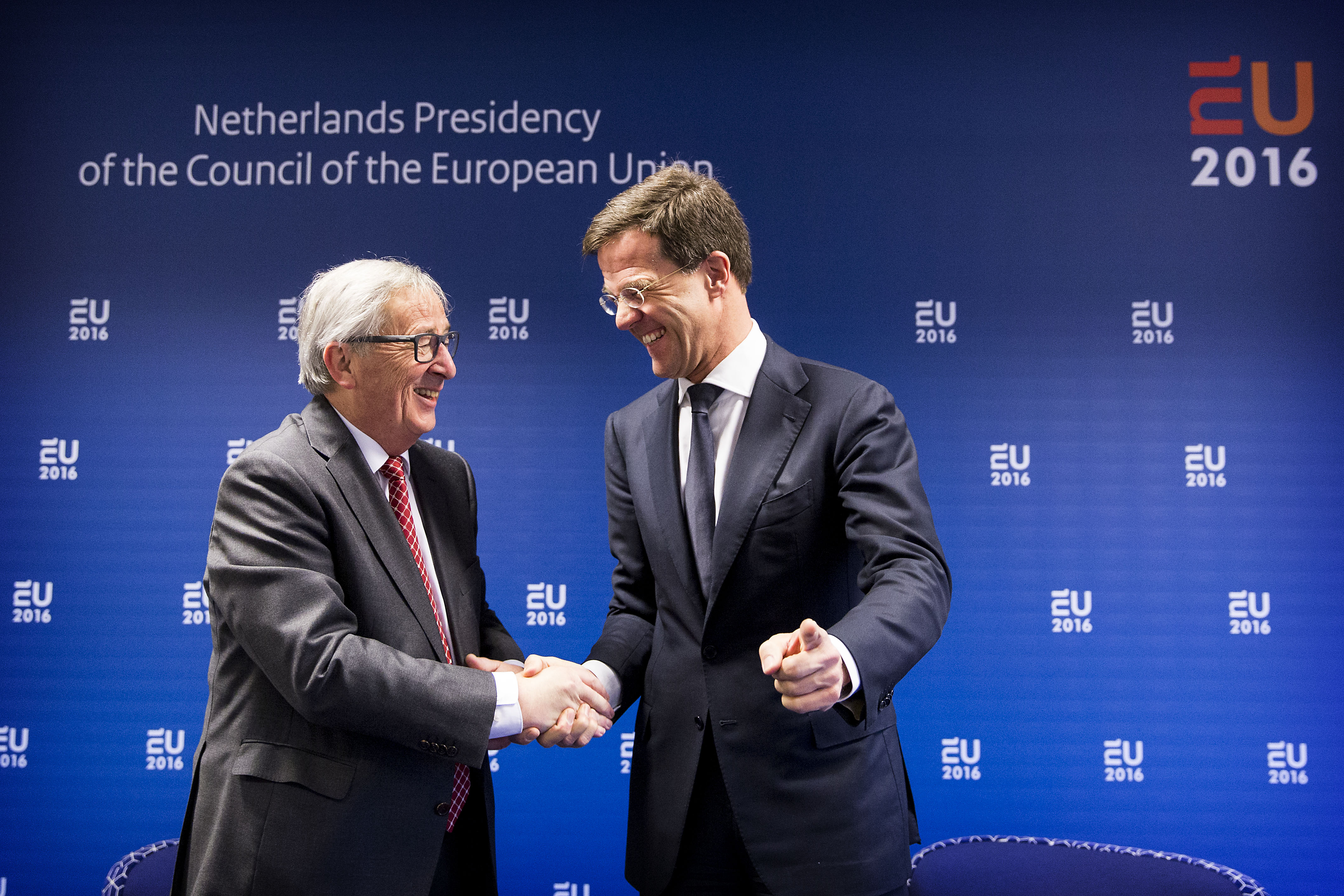 Amsterdam, 7 januari 2016 / Amsterdam, January 7th 2016. Premier Mark Rutte en president van de EU Commissie Jean-Laude Juncker. Dutch Prime Minister Mark Rutte and president of the EU Commissie Jean-Laude Juncker. Foto: Rijksoverheid/Valerie Kuypers – Photograph: Dutch Government/Valerie Kuypers